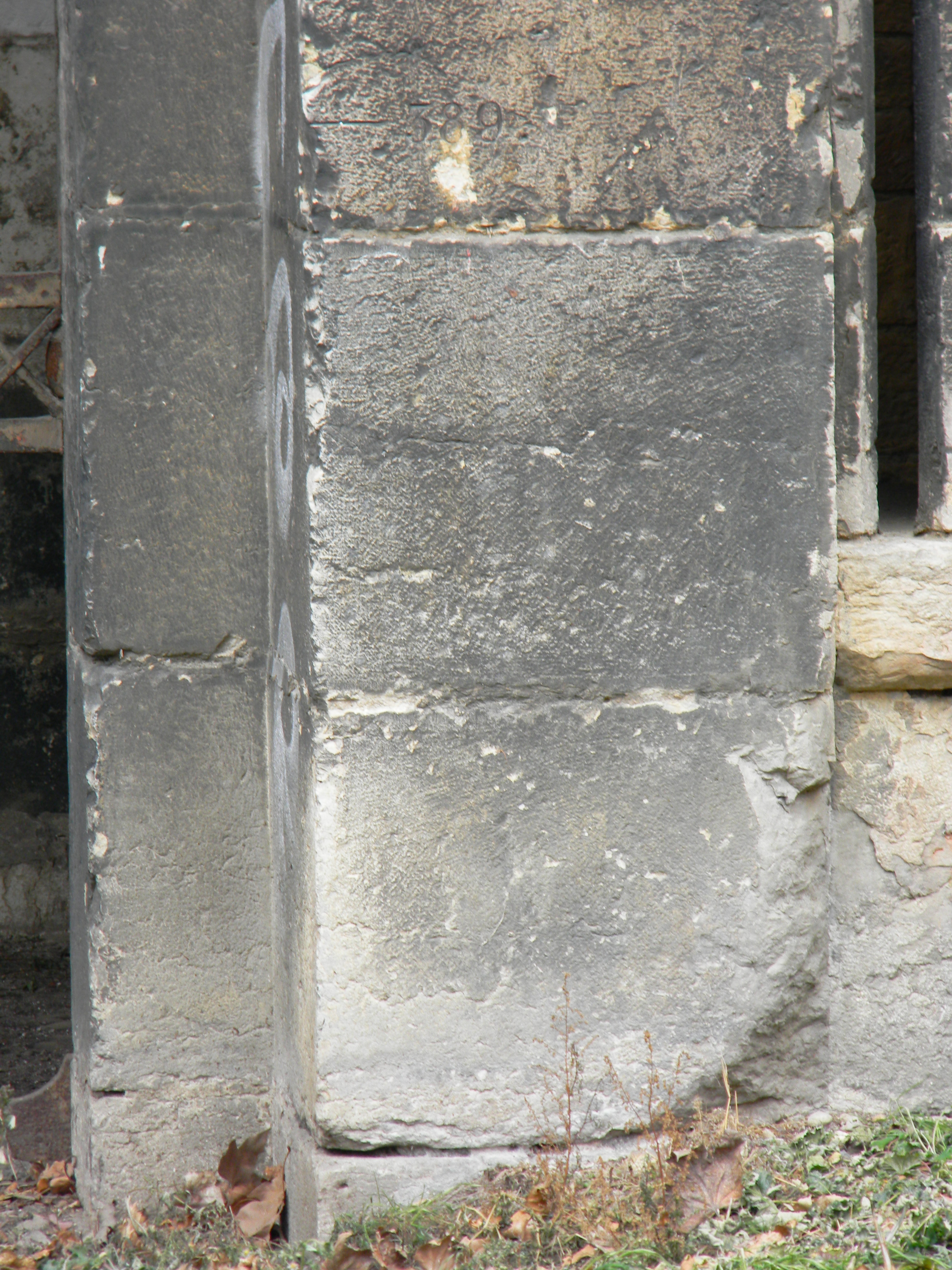 Altitude indiqué à l'entrée du fort de Loyasse: 389 (mètres?).